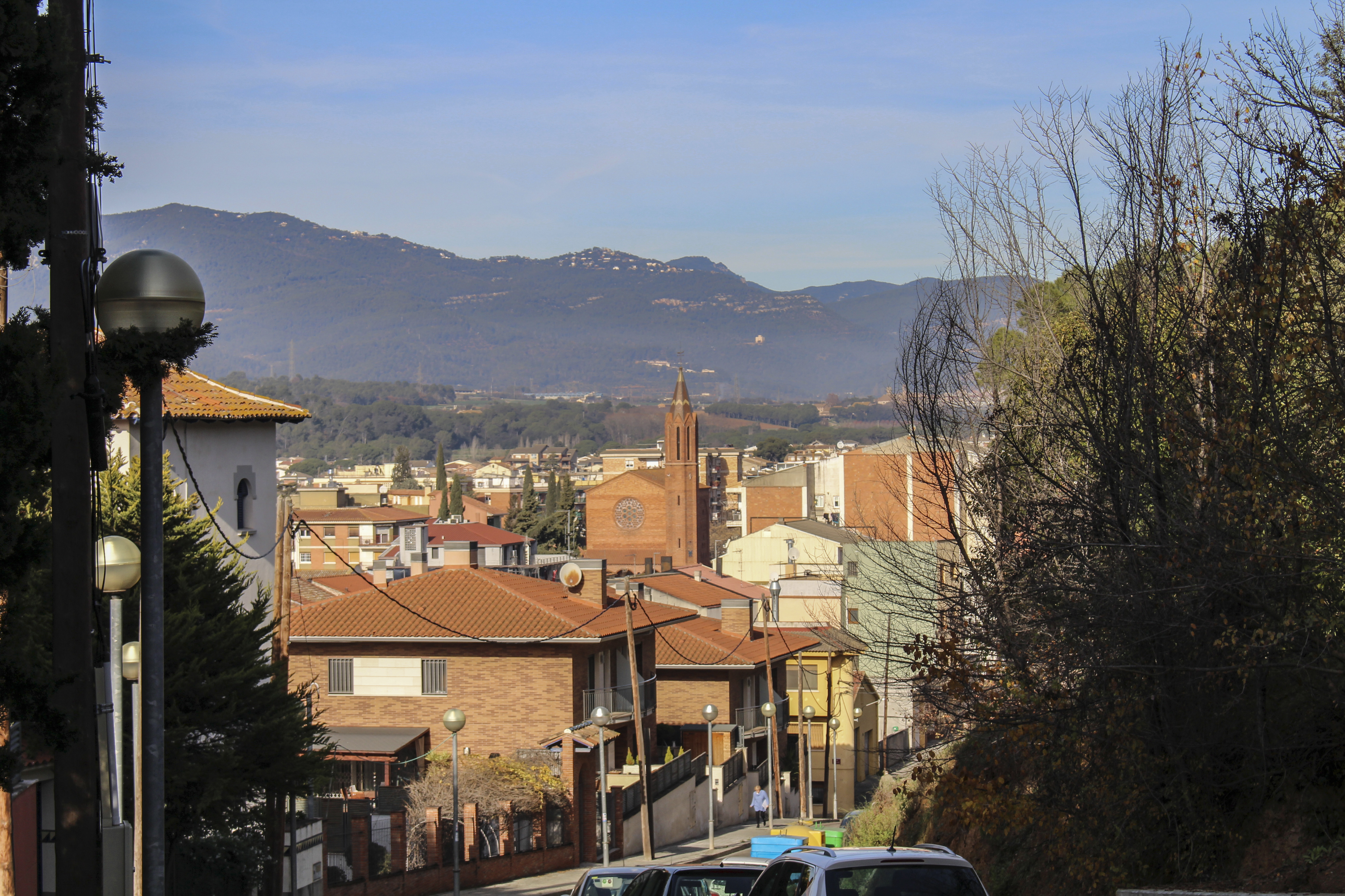 Edificio religioso